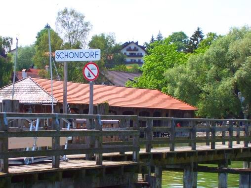 Schondorf am Ammersee, Bootshafen